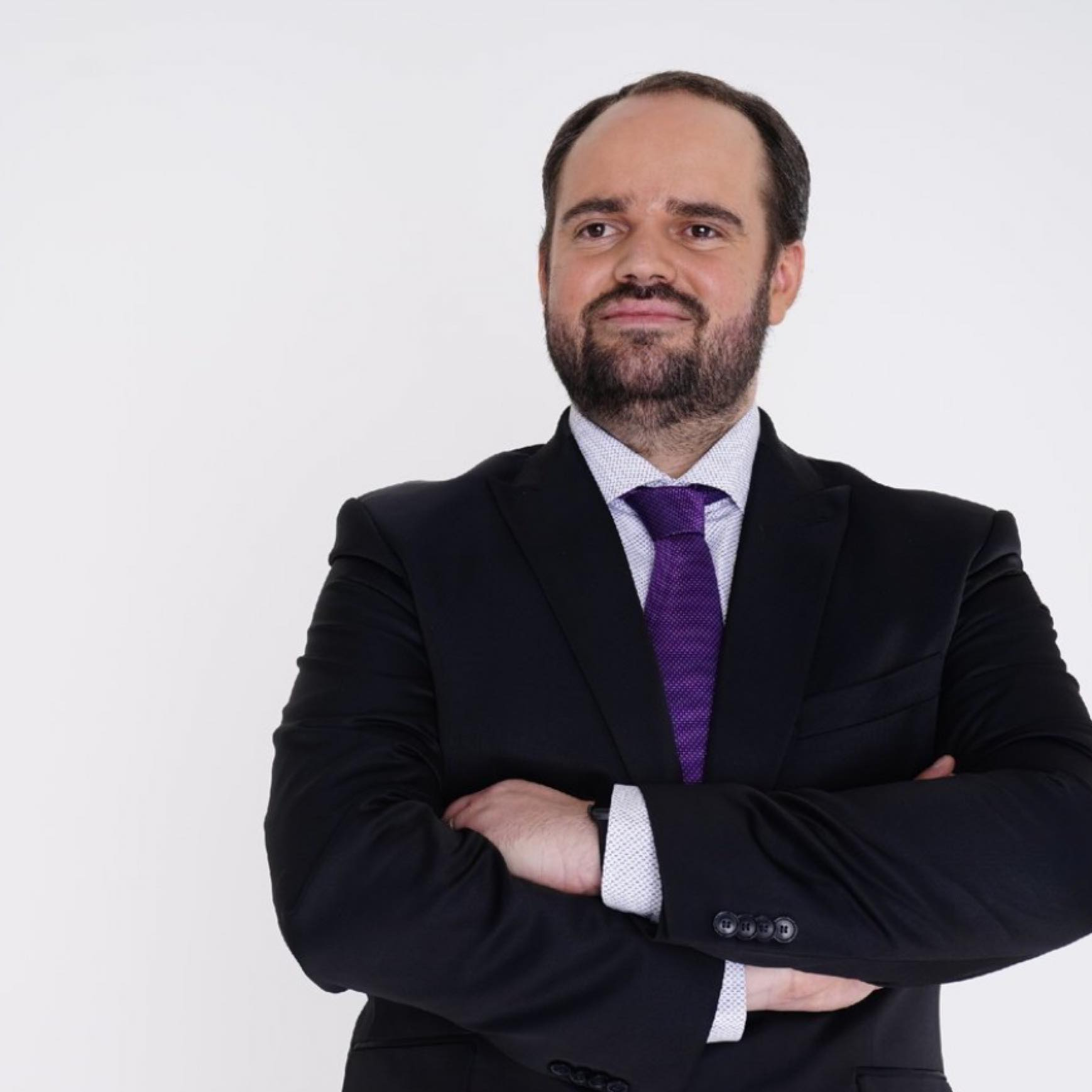 De Marc Goergen am Februar 2019